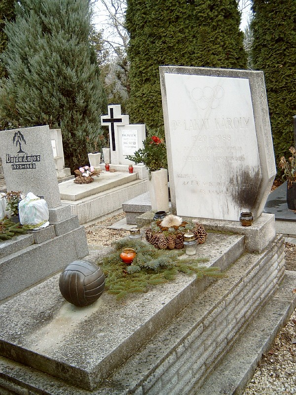 Lakat Károly (Győr, 1920. nov. 27. – Bp., 1988. dec. 3.): tanár, labdarúgó, sportvezető, szakíró sírja Budapesten. Farkasréti temető: 2/5-4-1.